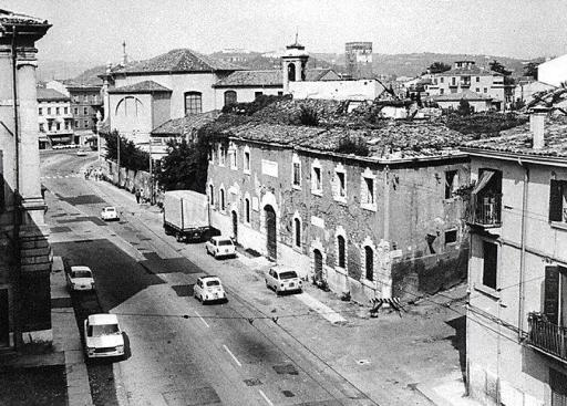 Verona: foto storica del carcere degli Scalzi prima della demolizione